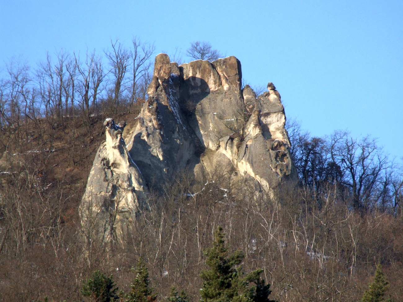 H6b, Sirok, Törökasztal